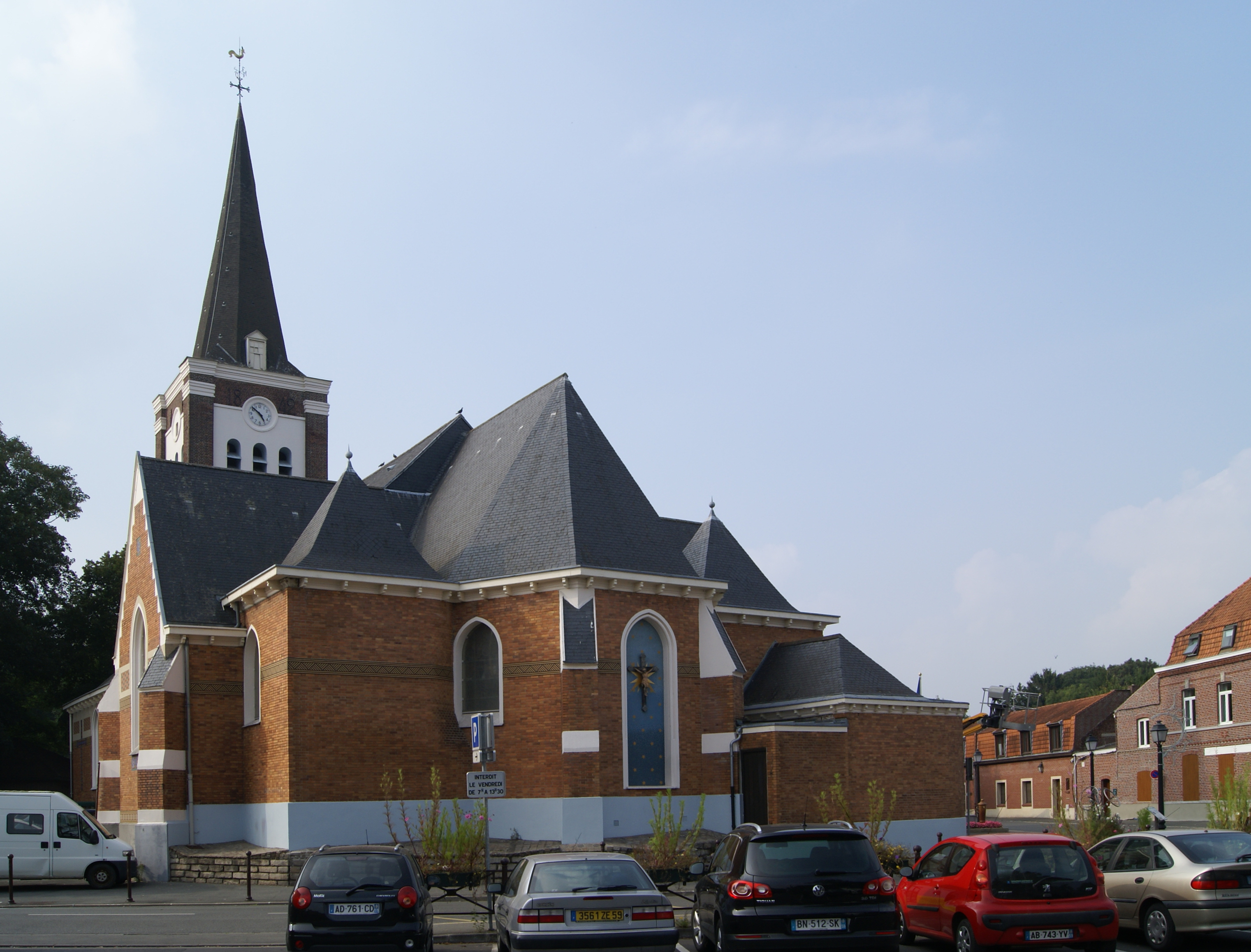 Église Saint-Pierre-en-Antioche d'Ascq, vue du parking rue Gaston Baratte.